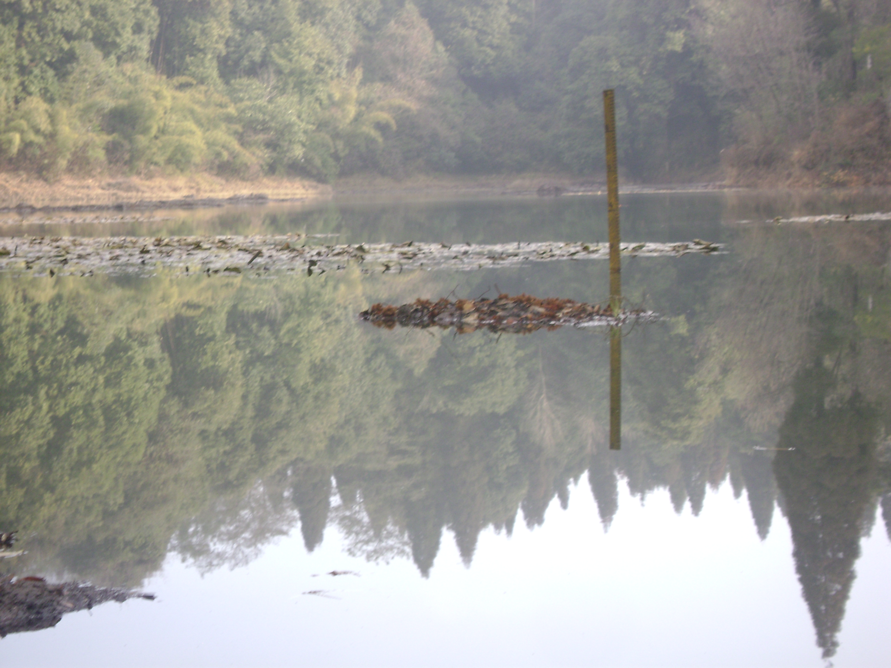 नेपाली: ईलाम जिल्लामा रहेको माई पोखरी